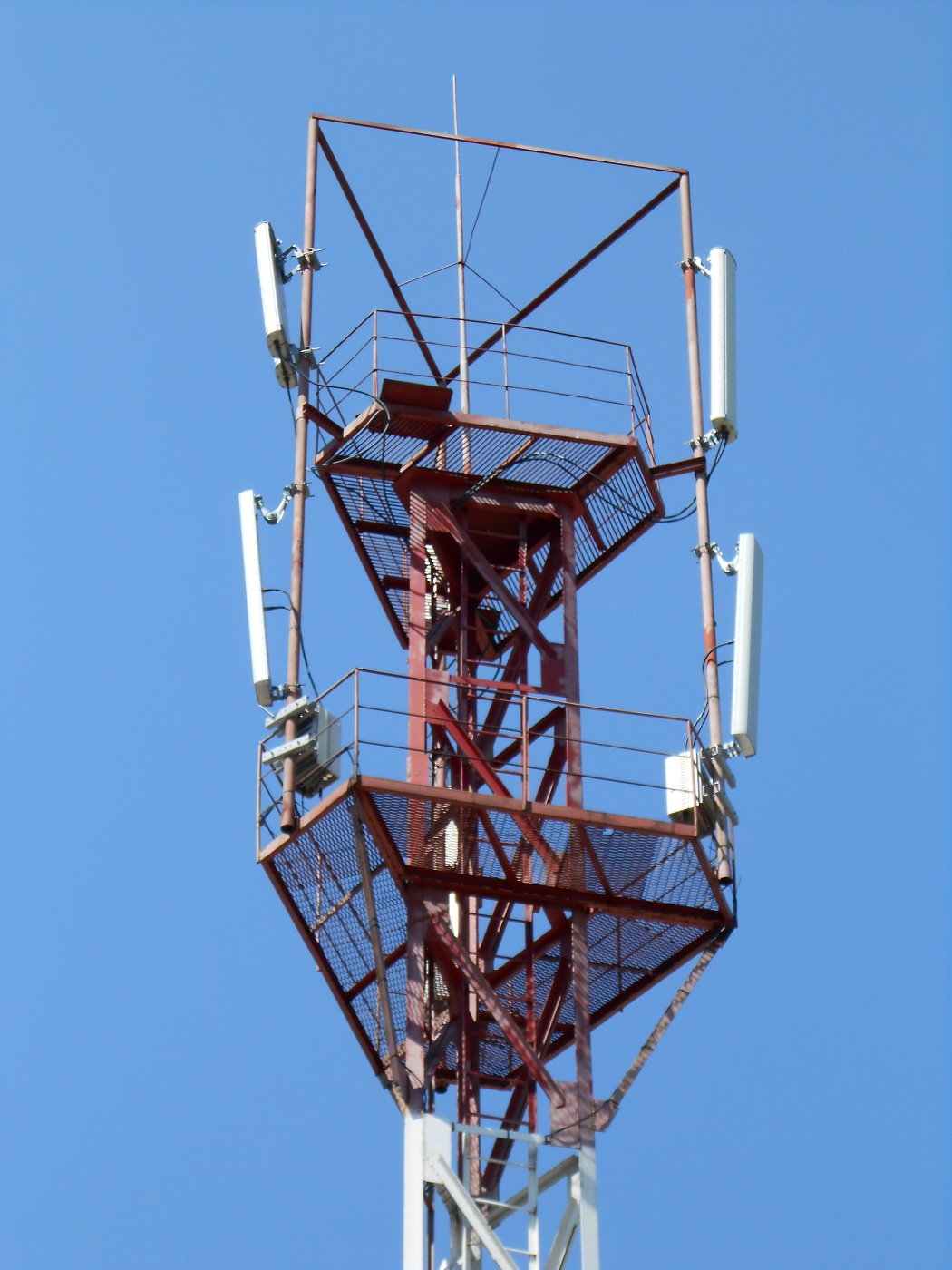 Сотовая вышка компании ИДК между Тирасполем и Ближним Хутором. Технология связи - CDMA.